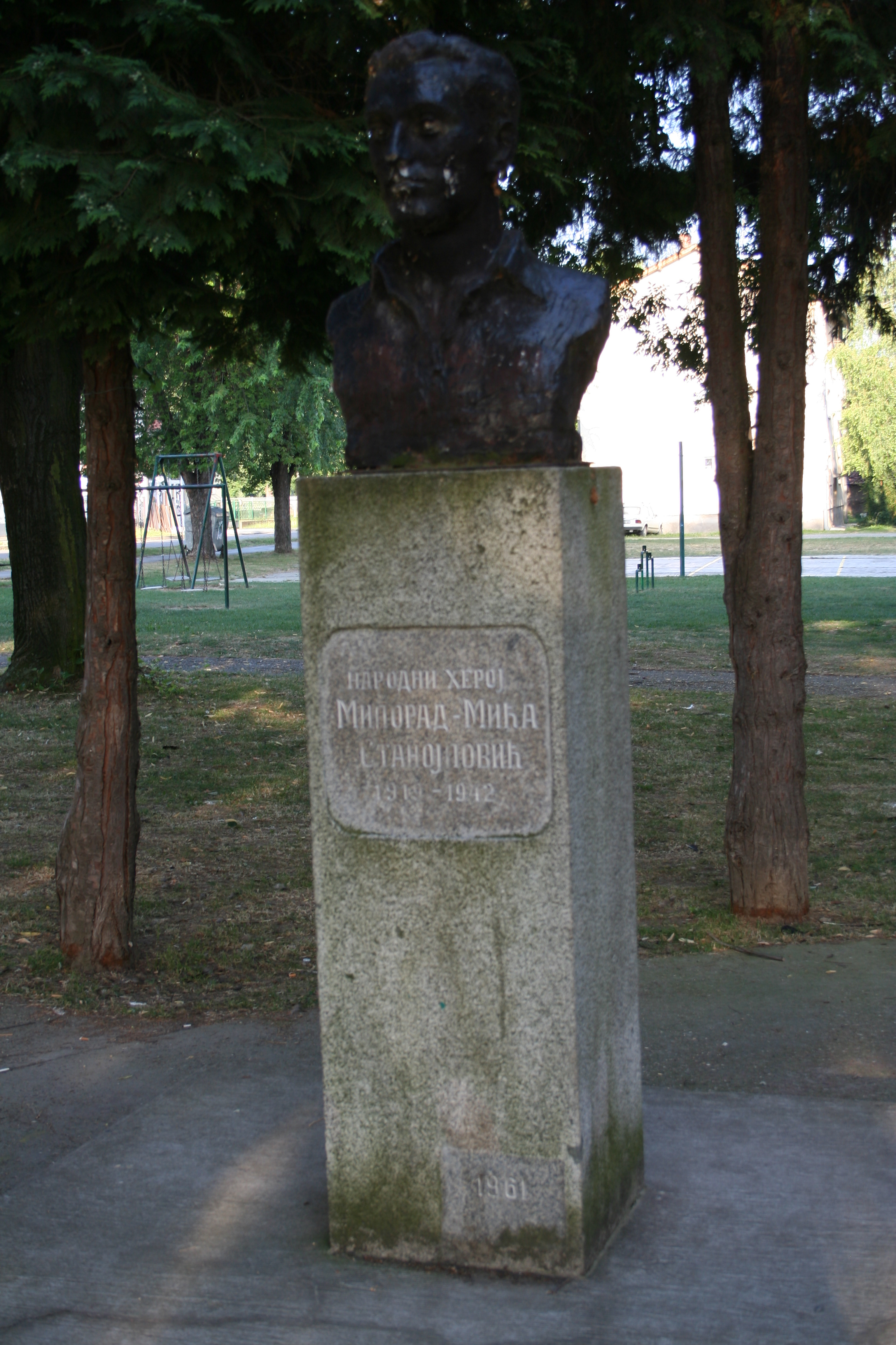 Spomenik Miloradu Stanojloviću ispred Doma kulture, Koceljeva